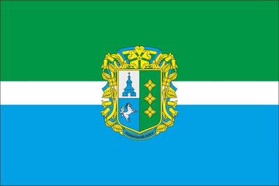 прапор Кіцманського району Чернівецької області